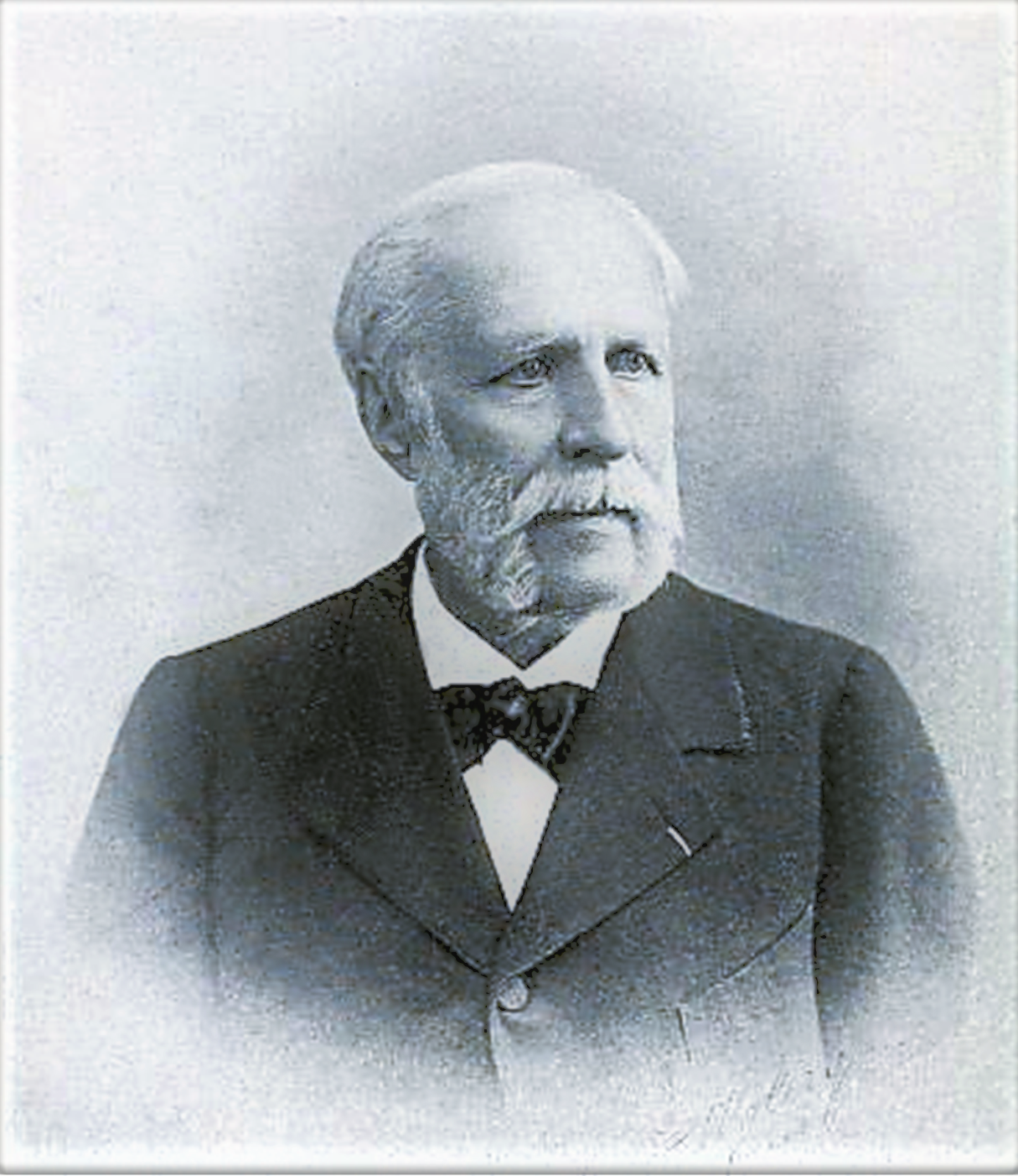 Jules de Seynes (1833-1912), französischer Botaniker